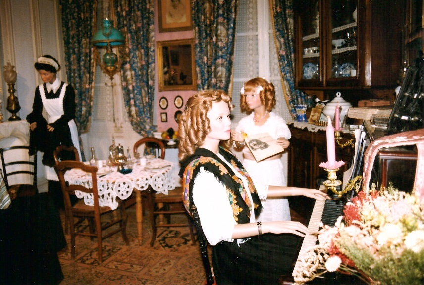 Musée du Hurepoix (Palaiseau) - Salon Bourgeois fin 19 ème - photo prise en 1998